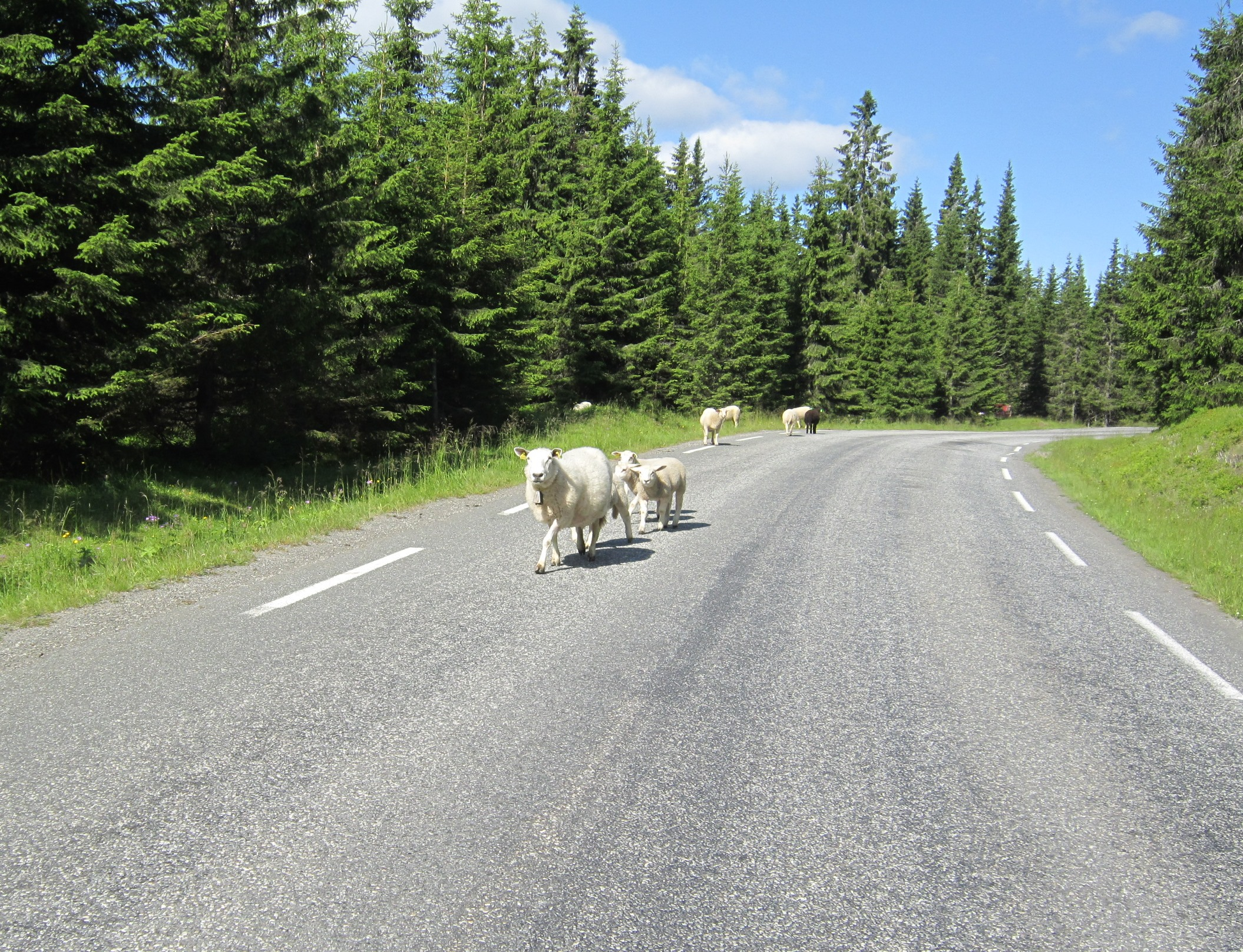 Sauer på Saksumdalsvegen (fylkesvei 2524, tidl. 313)